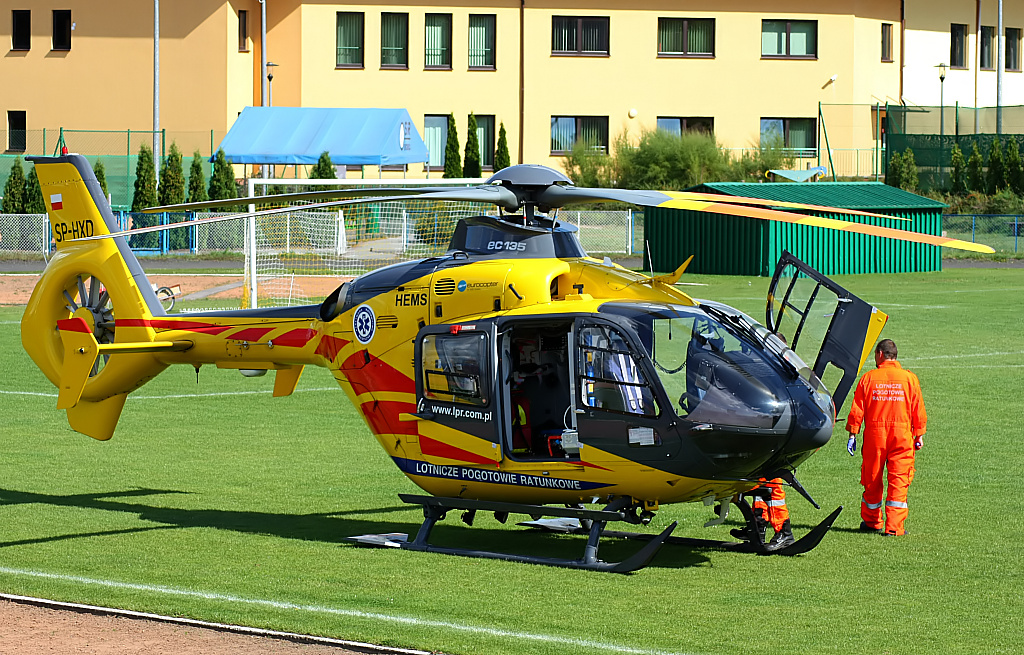 reg.: SP-HXD